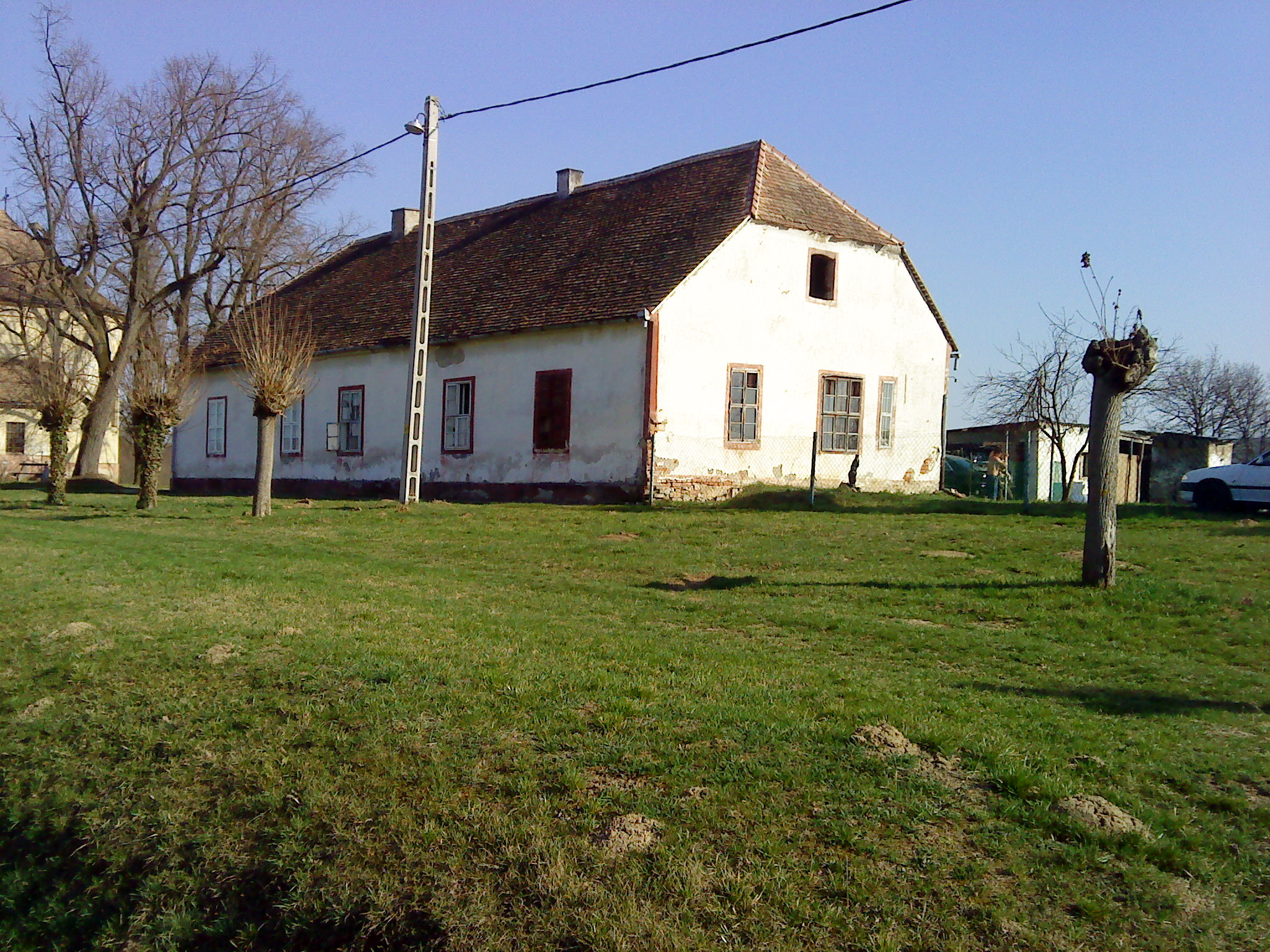 Garéi régi iskola, ma családi ház